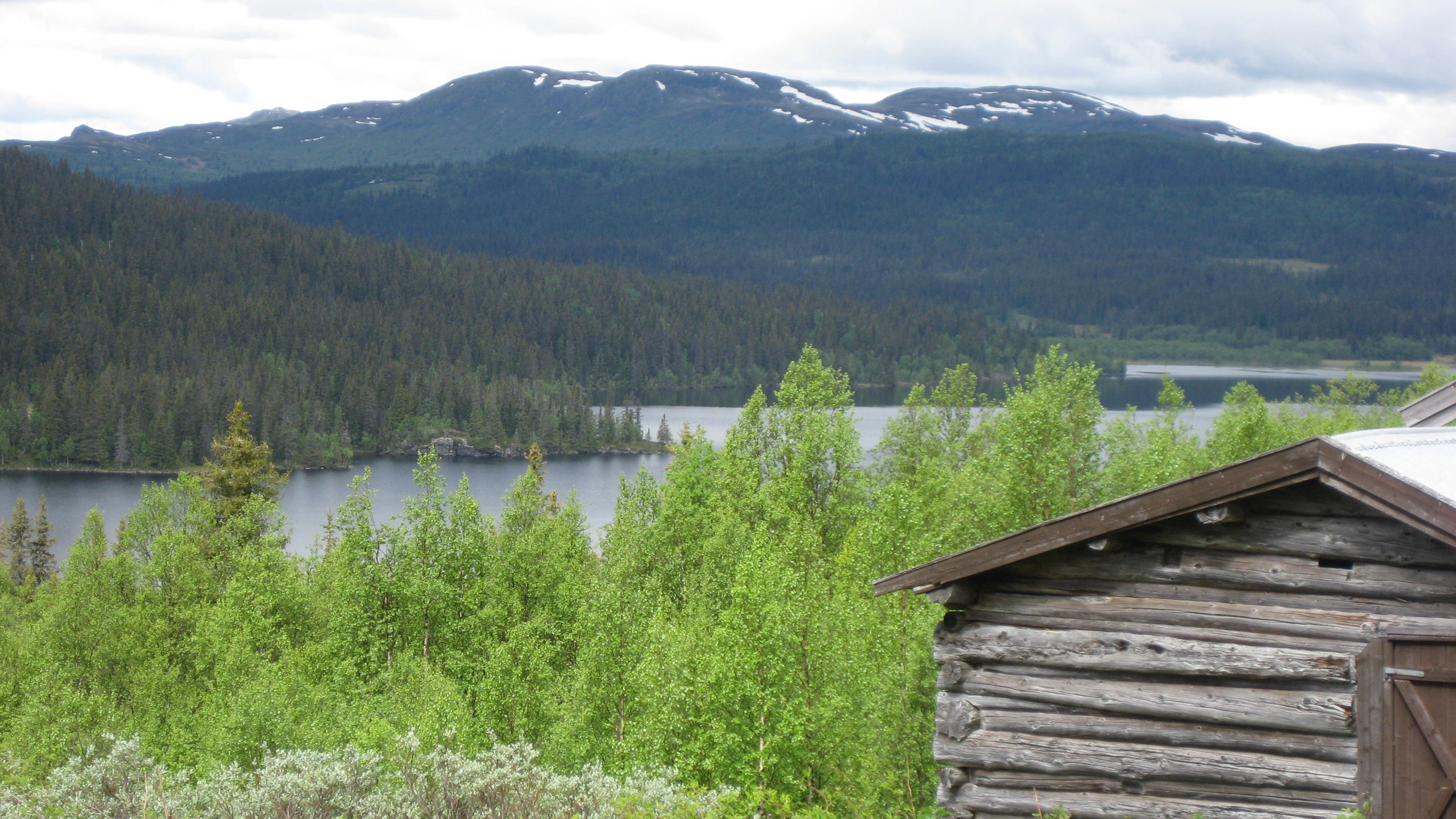 Synnfjorden i Torpa. Søre Synnsætra i forgrunnen